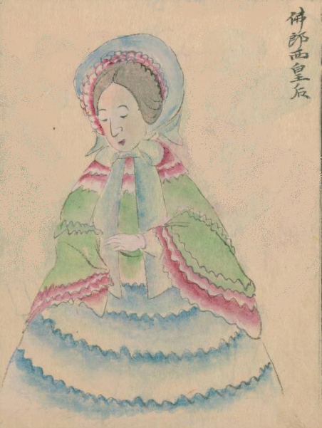 ナポレオン3世の妻 ウジェニー・ド・モンティジョ高嶋祐啓『欧西行紀』